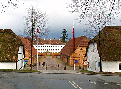 Moesgård Museum ved Århus, Denmark Image taken by me user:Nico-dk / Nils Jepsen